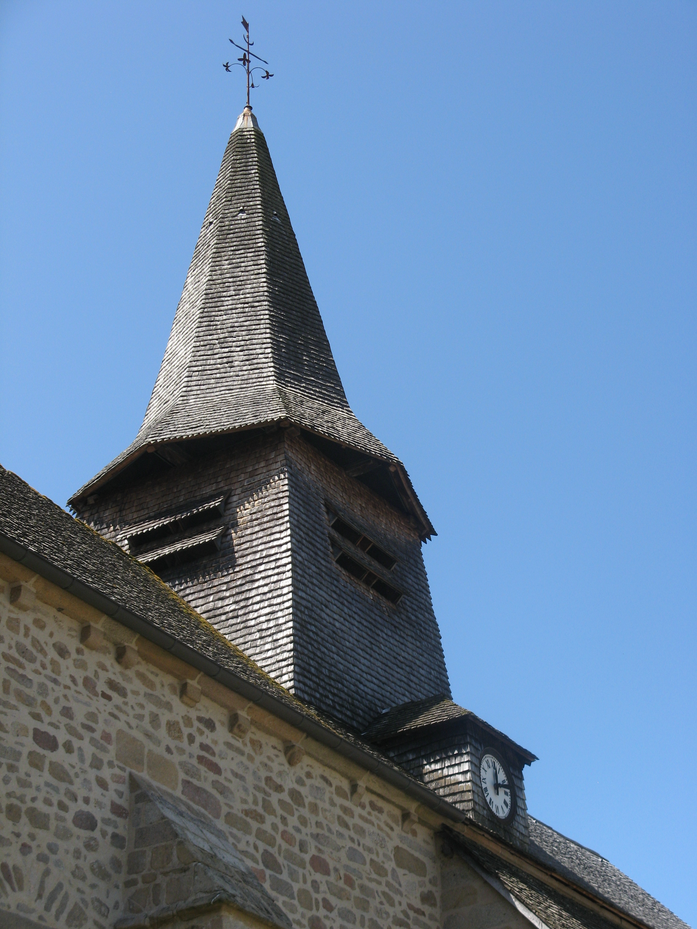 Église Saint-Martin de Nedde : clocher et toiture en bardeaux de châtaigner.